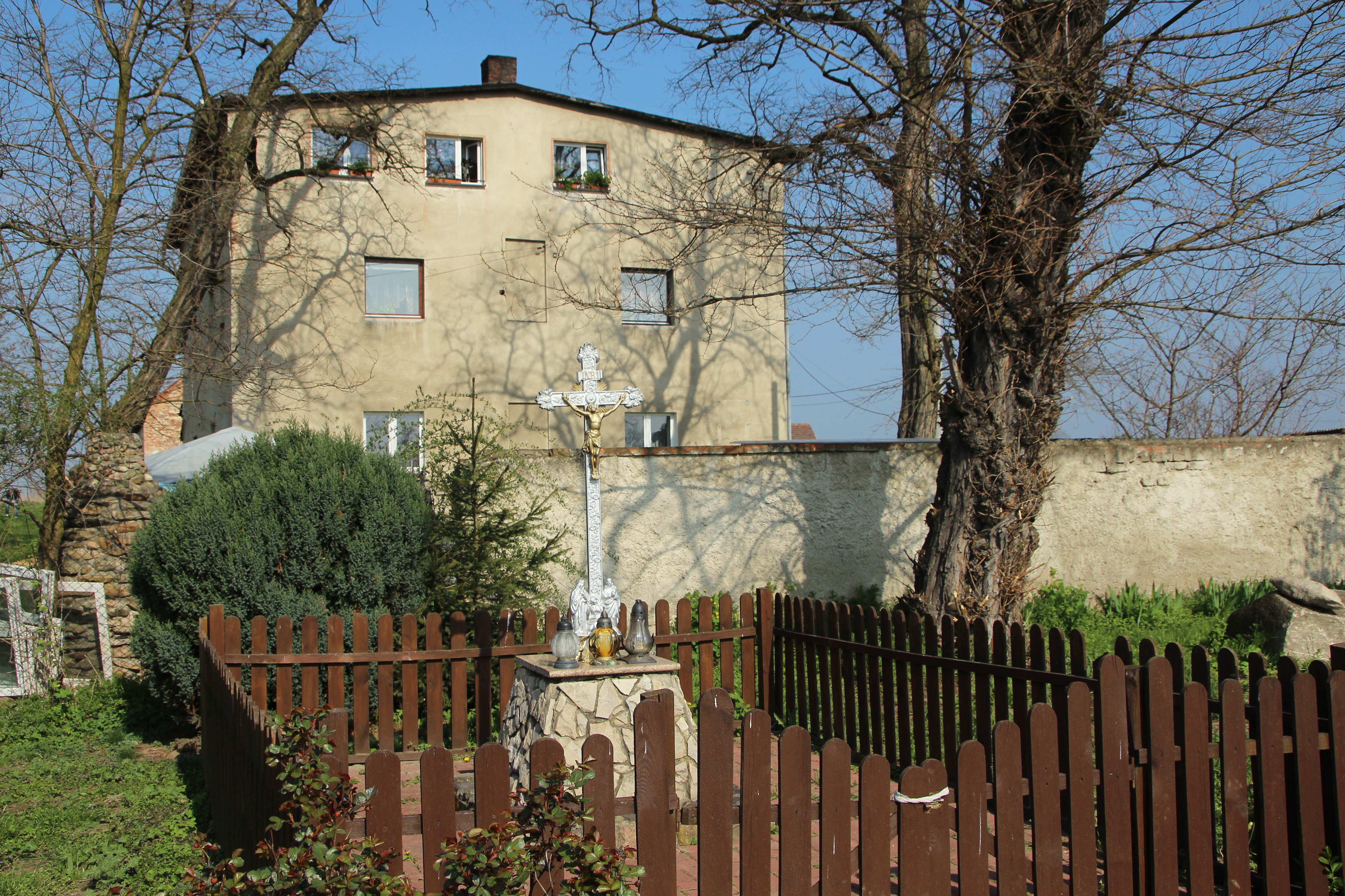 Wielkie Łąki – wieś w Polsce położona w województwie opolskim, w powiecie nyskim, w gminie Korfantów.